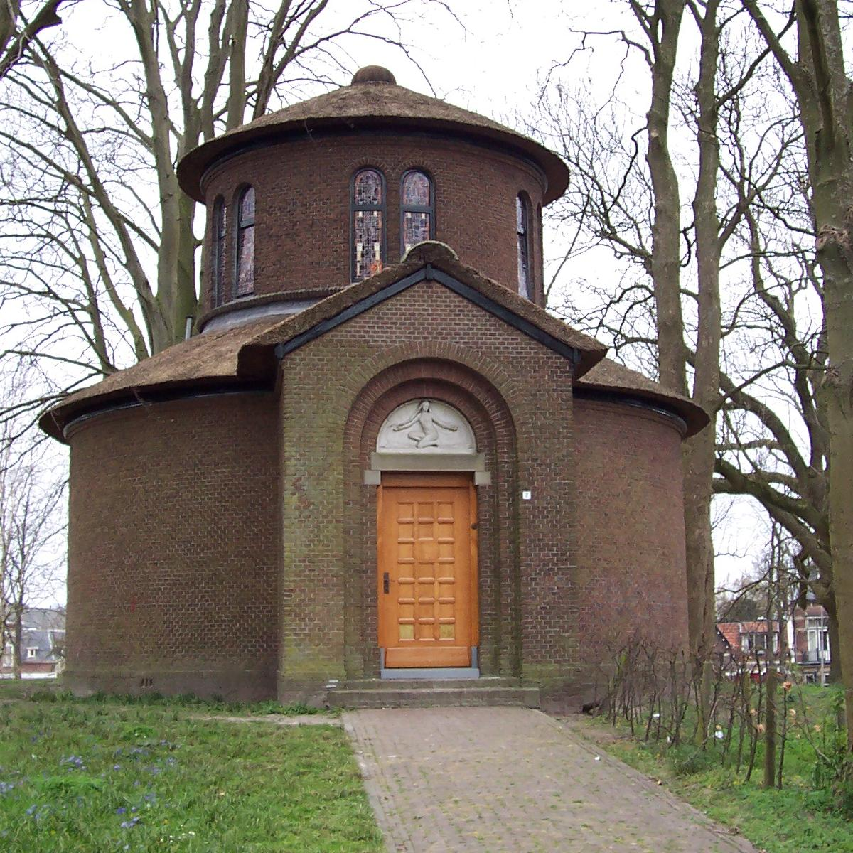 Ljouwert, Pier Pander Timpel